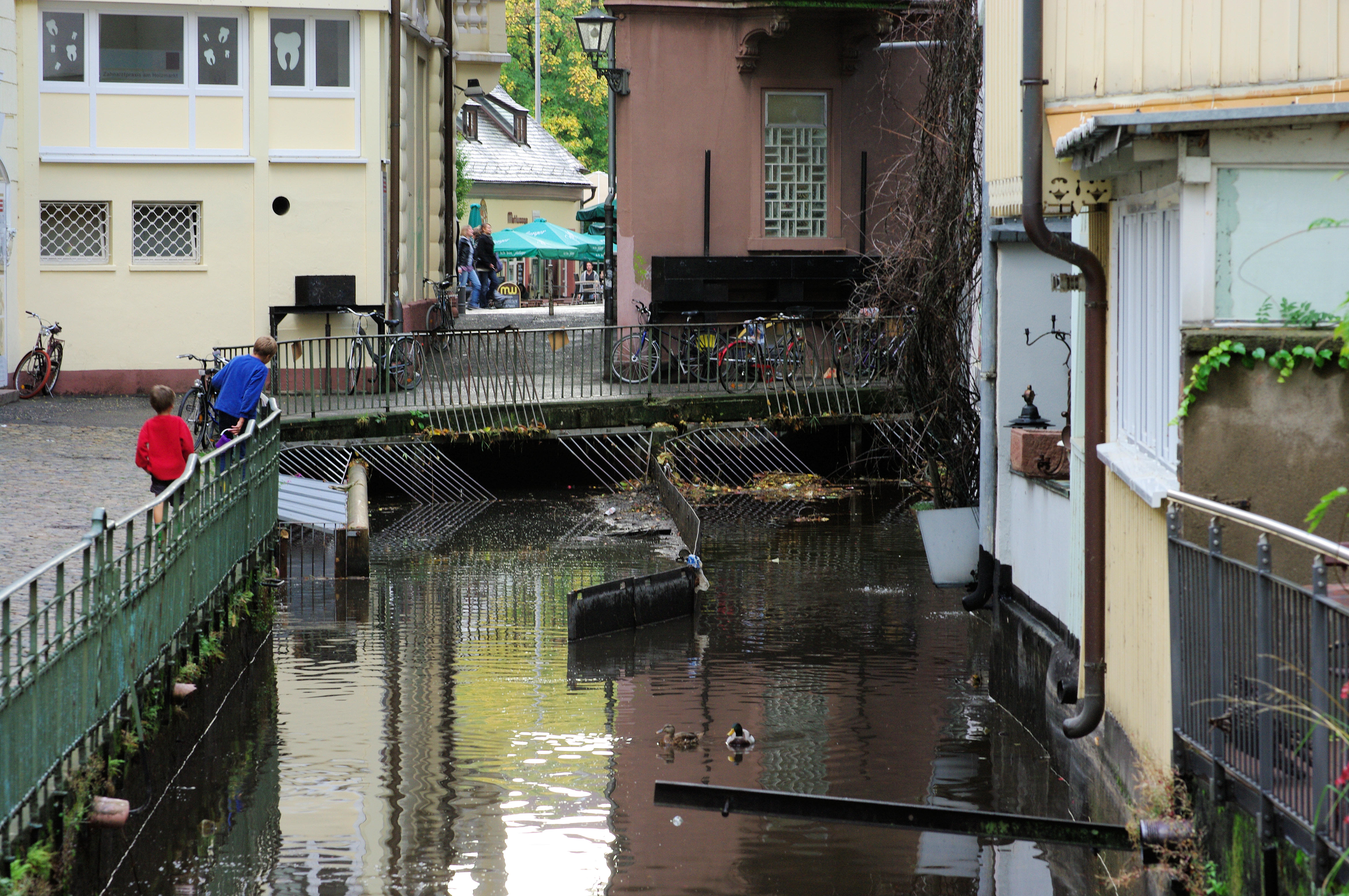 Der Ewige Teiler in der Fischerau Bachabschlag 2009